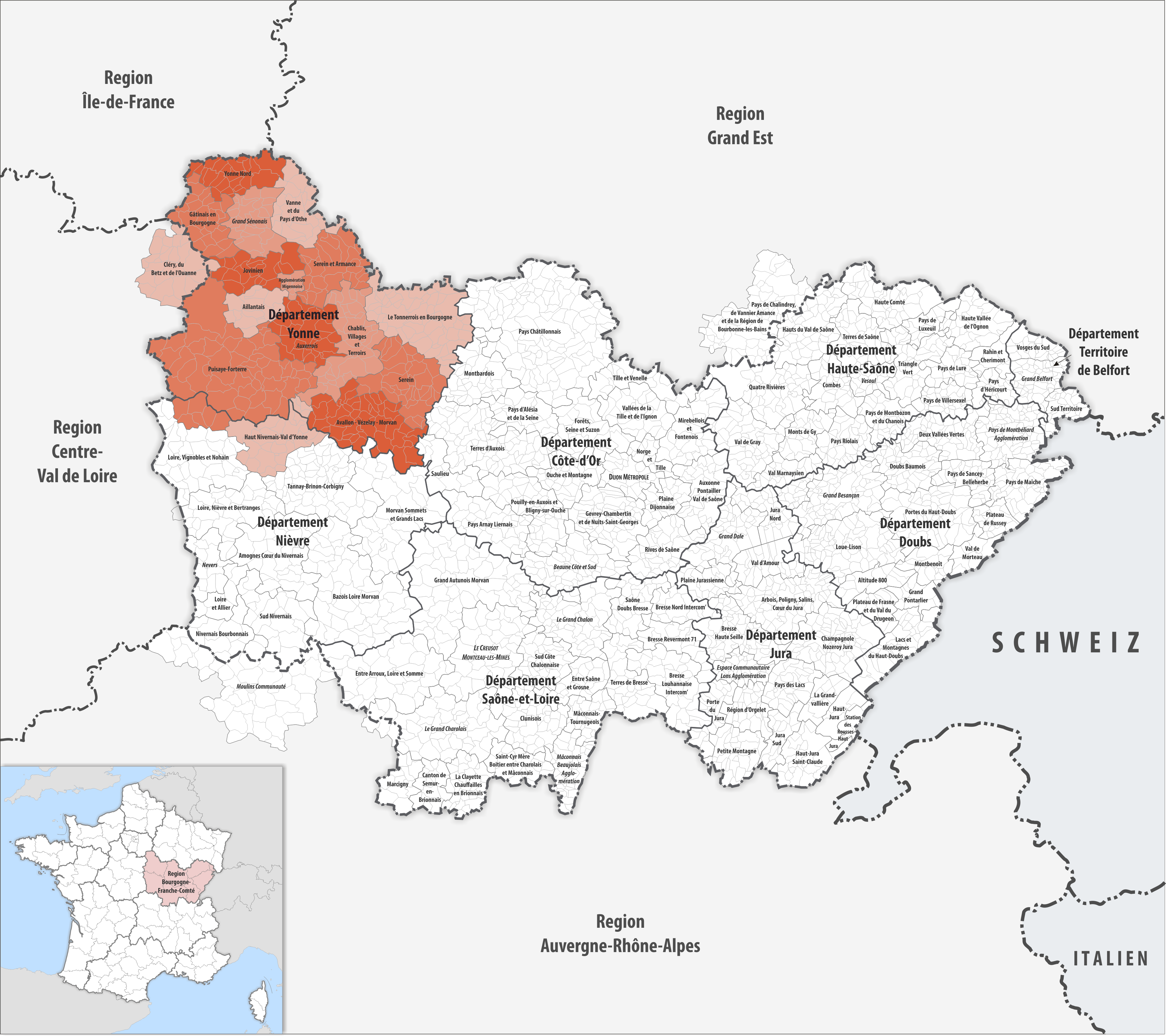 Lage des Gemeindeverbandes Yonne